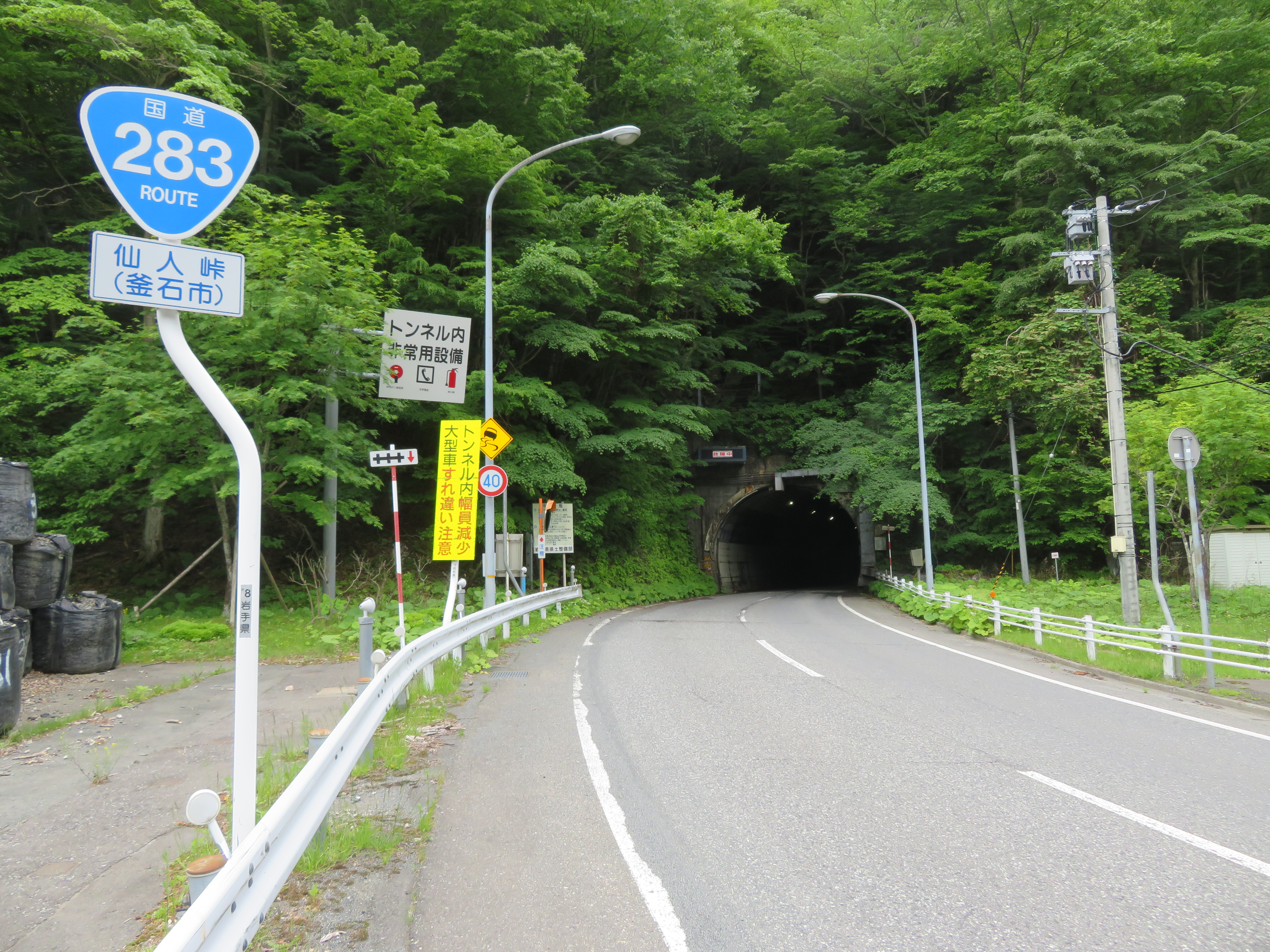 国道283号線仙人トンネル（岩手県釜石市側坑口付近を撮影） Canon PowerShot SX720 HS